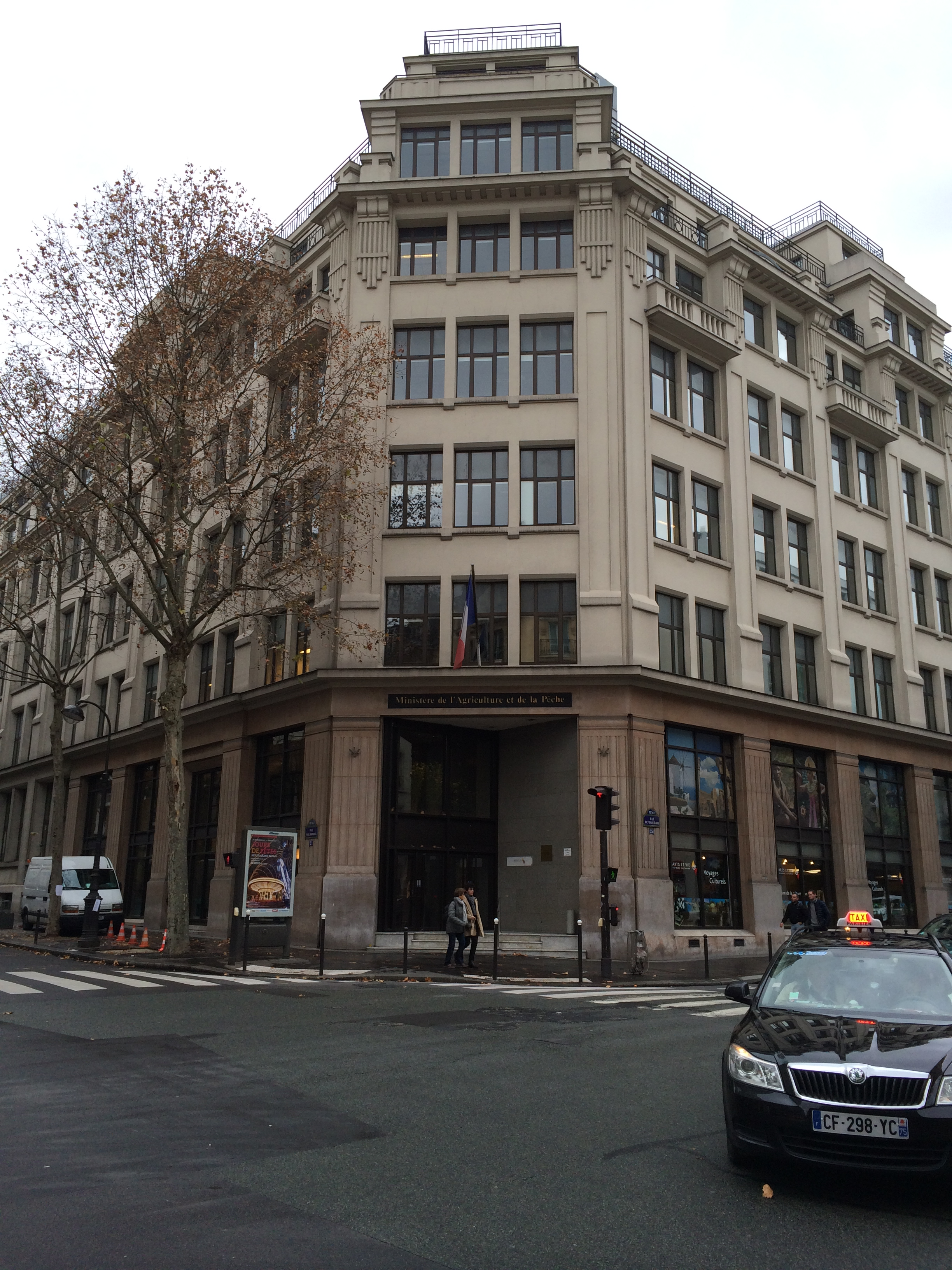 Ministère de l'Agriculture (France), rue Vaugirard en décembre 2013.